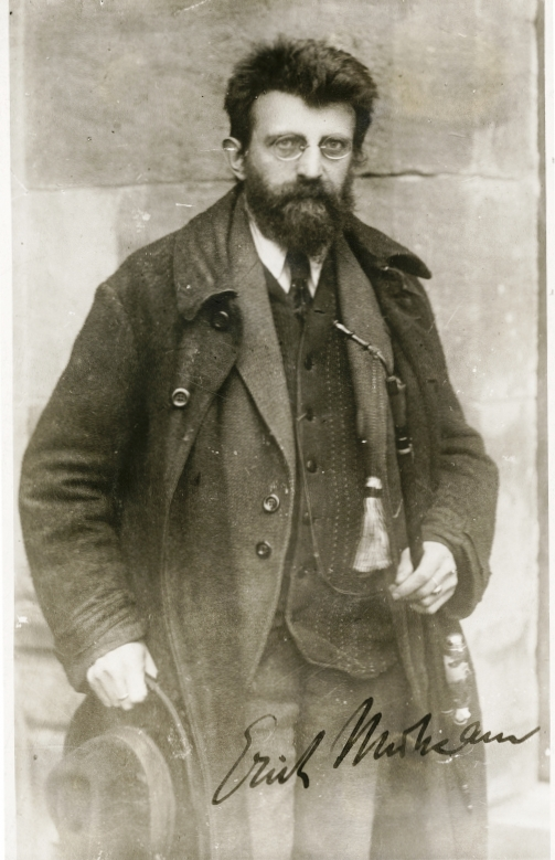 Erich Mühsam (1878–1934) in der Festungshaftanstalt Ansbach